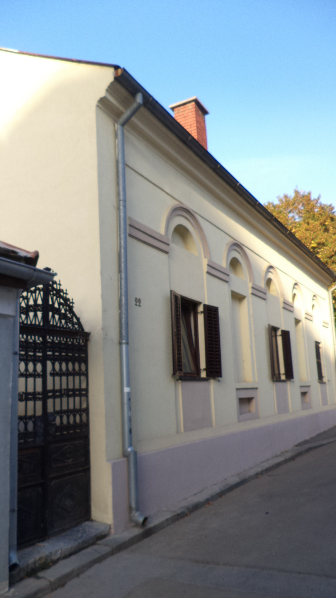 Зграда Велике школе